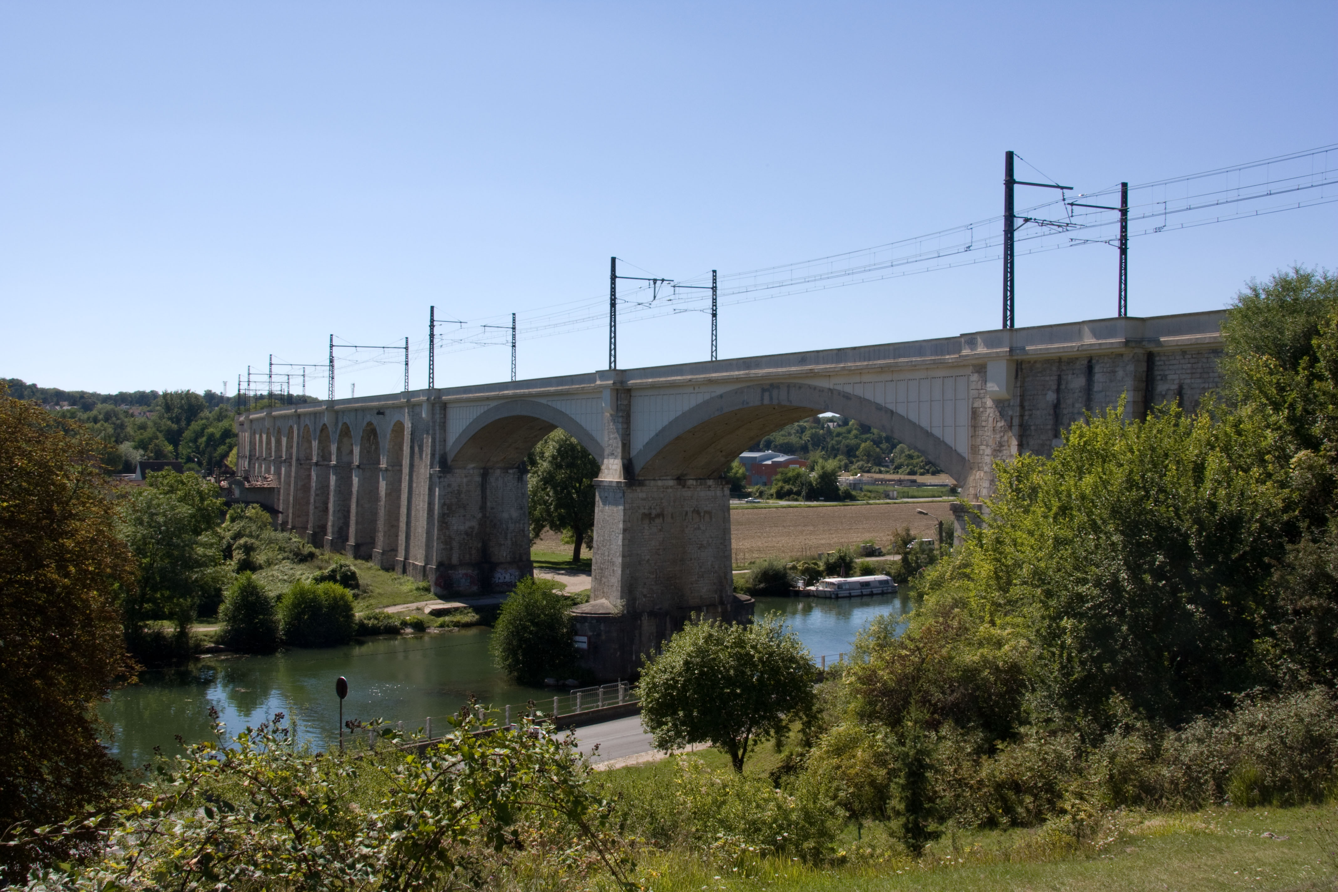 Viaduc de Moret-sur-Loing, ligne classique Paris - Marseille, Seine-et-Marne, France